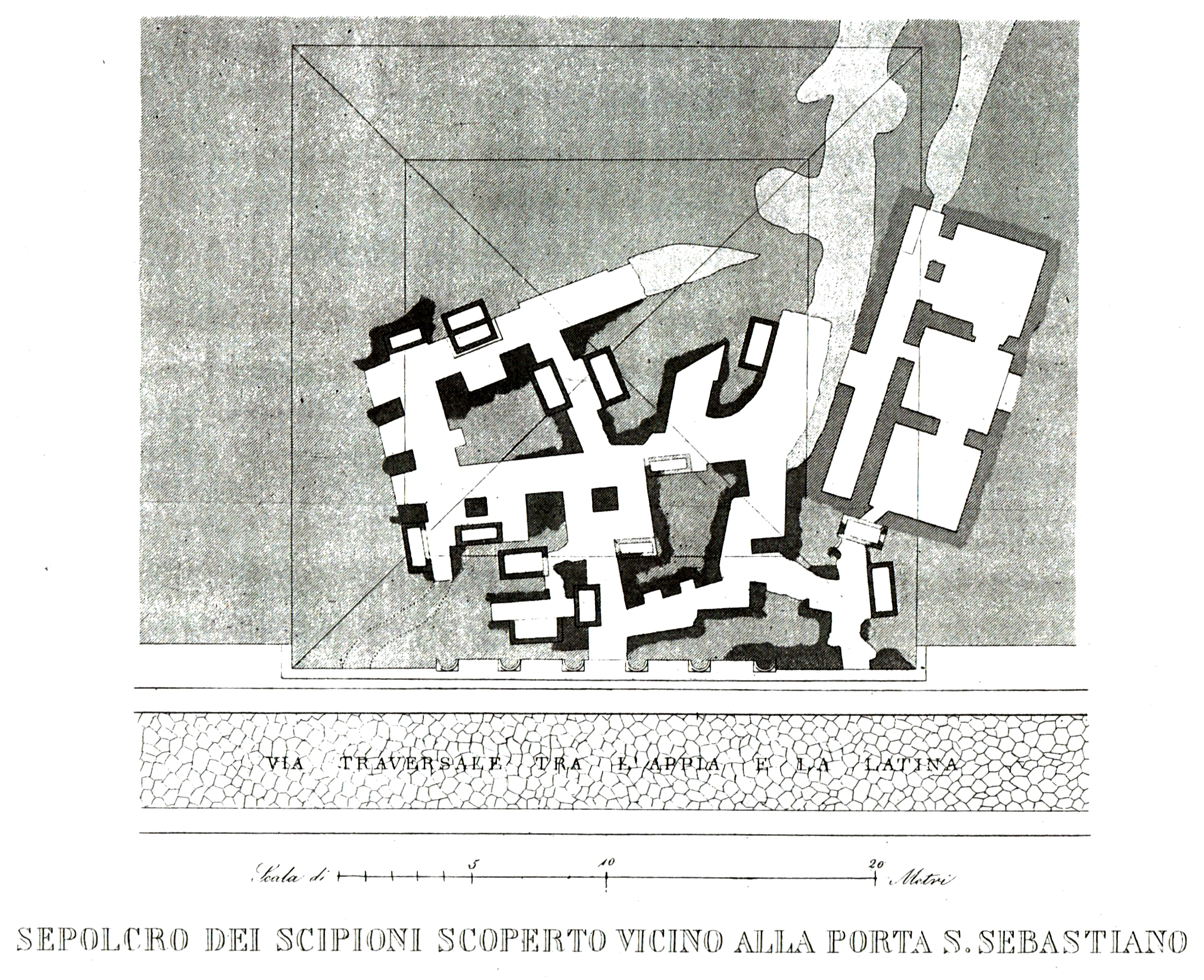 Grundriss des Scipionengrabes